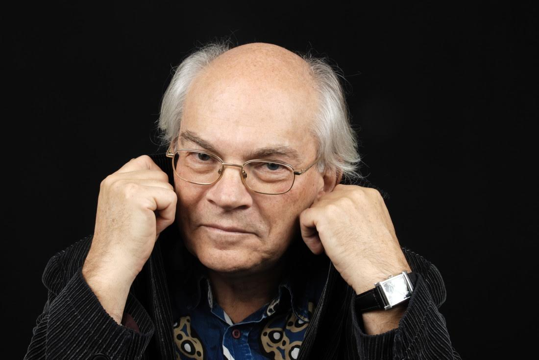 Alain Jaubert